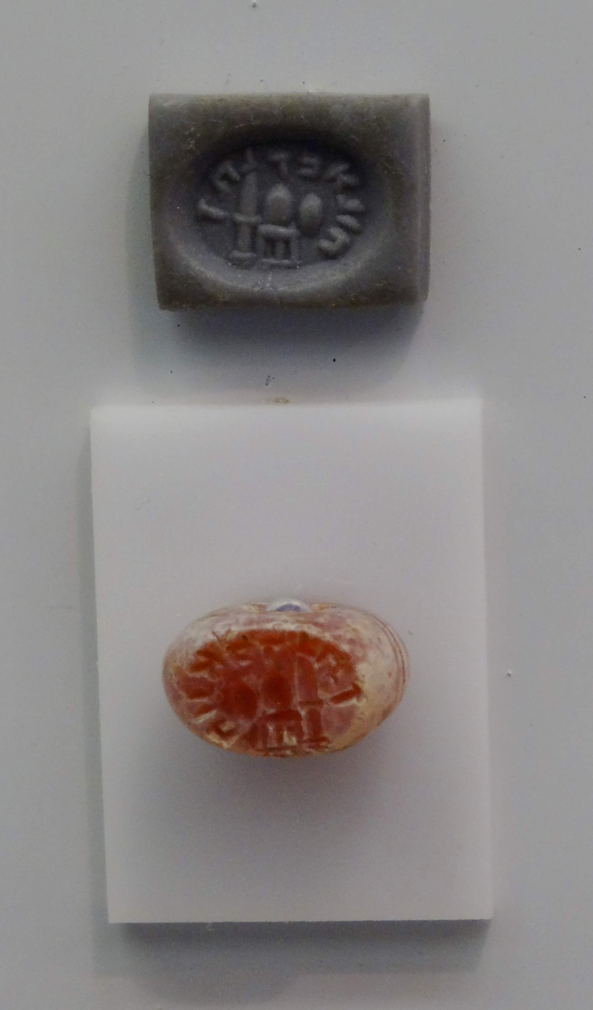 חותמת של הונא בר נתן הנמצאת במוזיאון הכט.